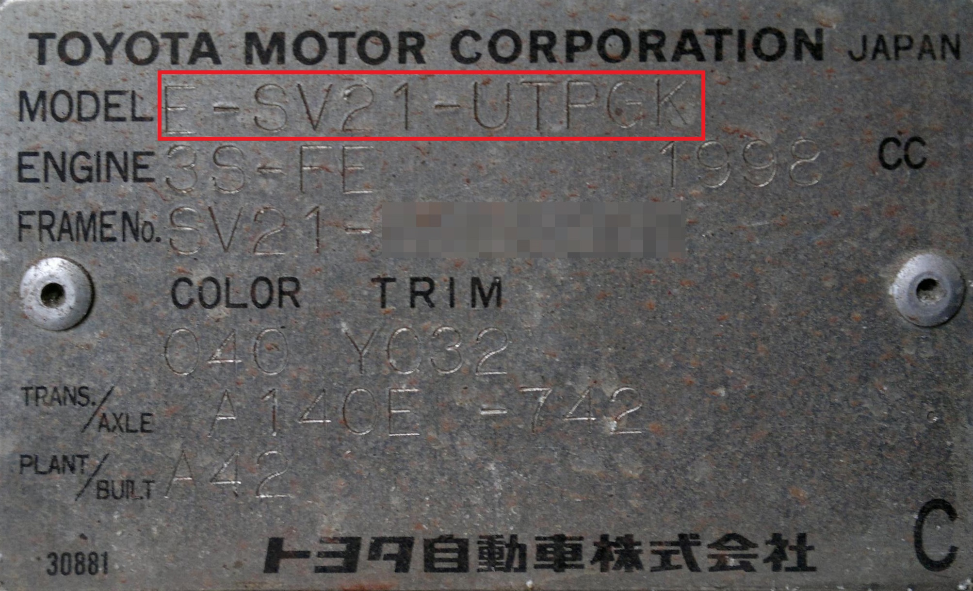 Фото подкапотной таблички с выделенным номером комплектации